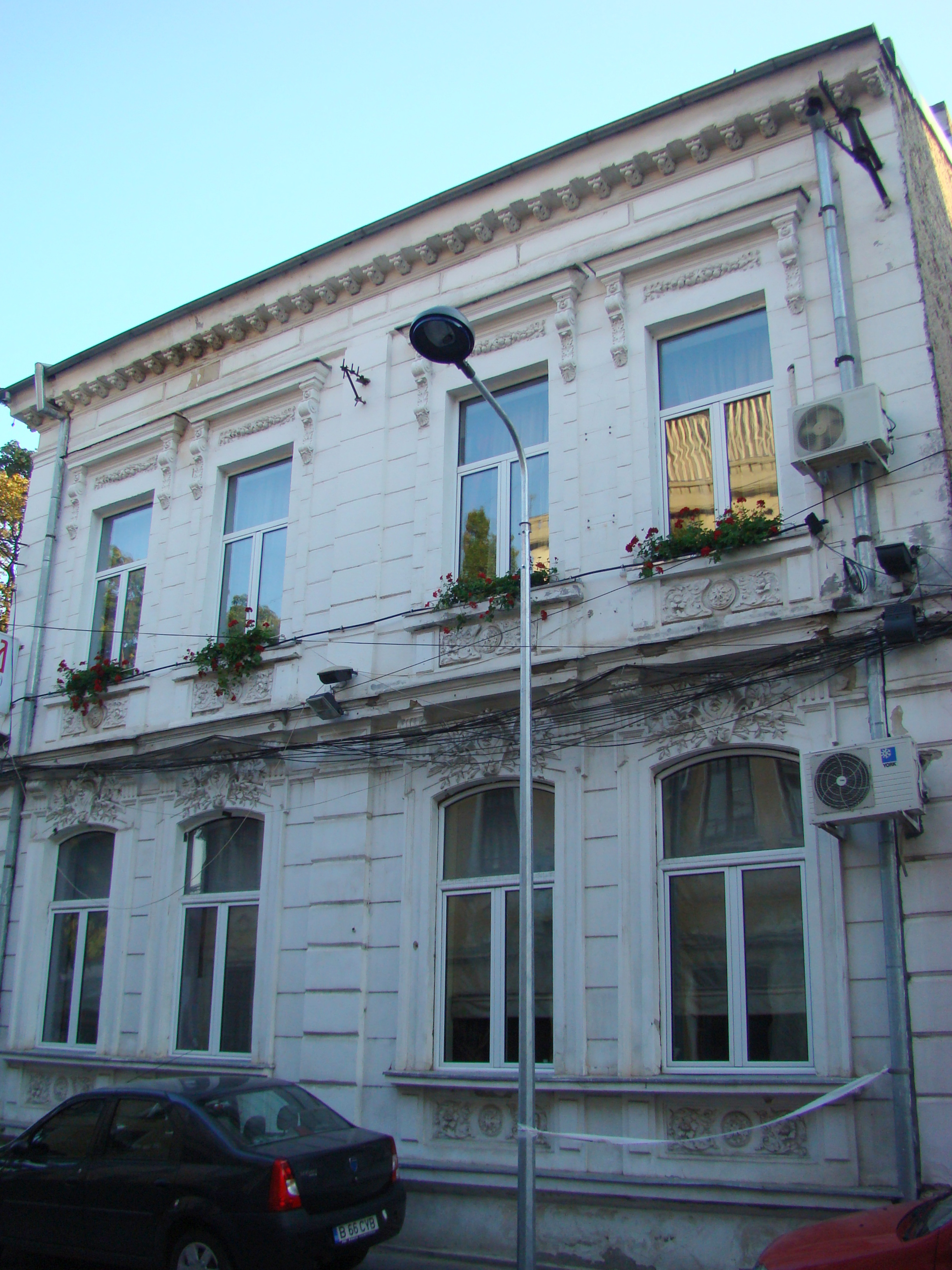 Casă monument istoric, str. Theodor Aman, nr.27